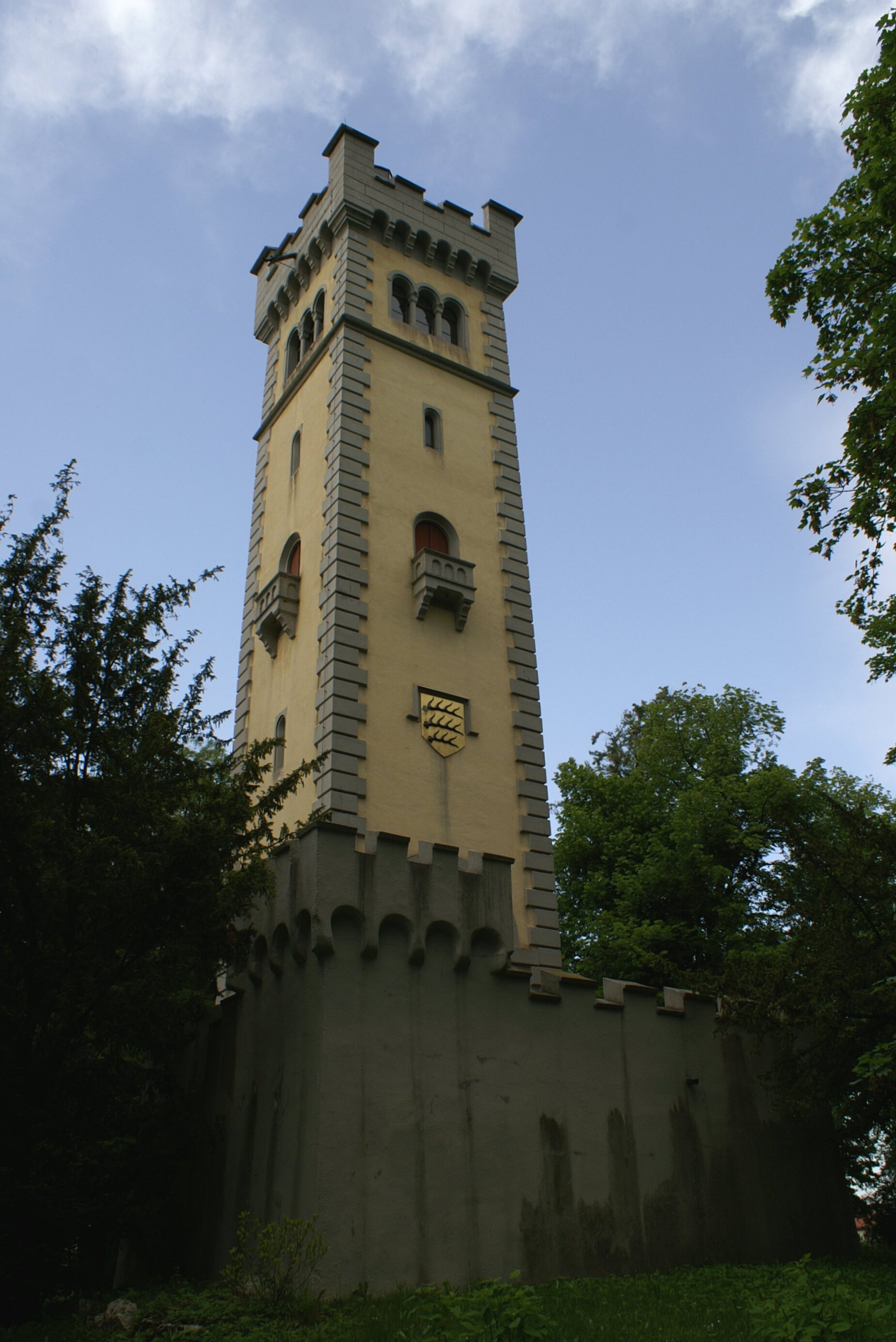 Der Wolfertturm in Ehingen (Donau) wurde 1891 als "Kaiser-Wilhelm-Gedächtnisturm" erbaut. Der Aussichtsturm ist eines der frühesten Betonbauwerke Süddeutschlands.